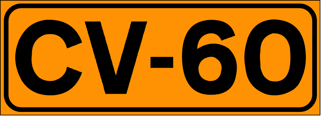 Inidcador de la Carretera de la Comunidad Valenciana CV-60